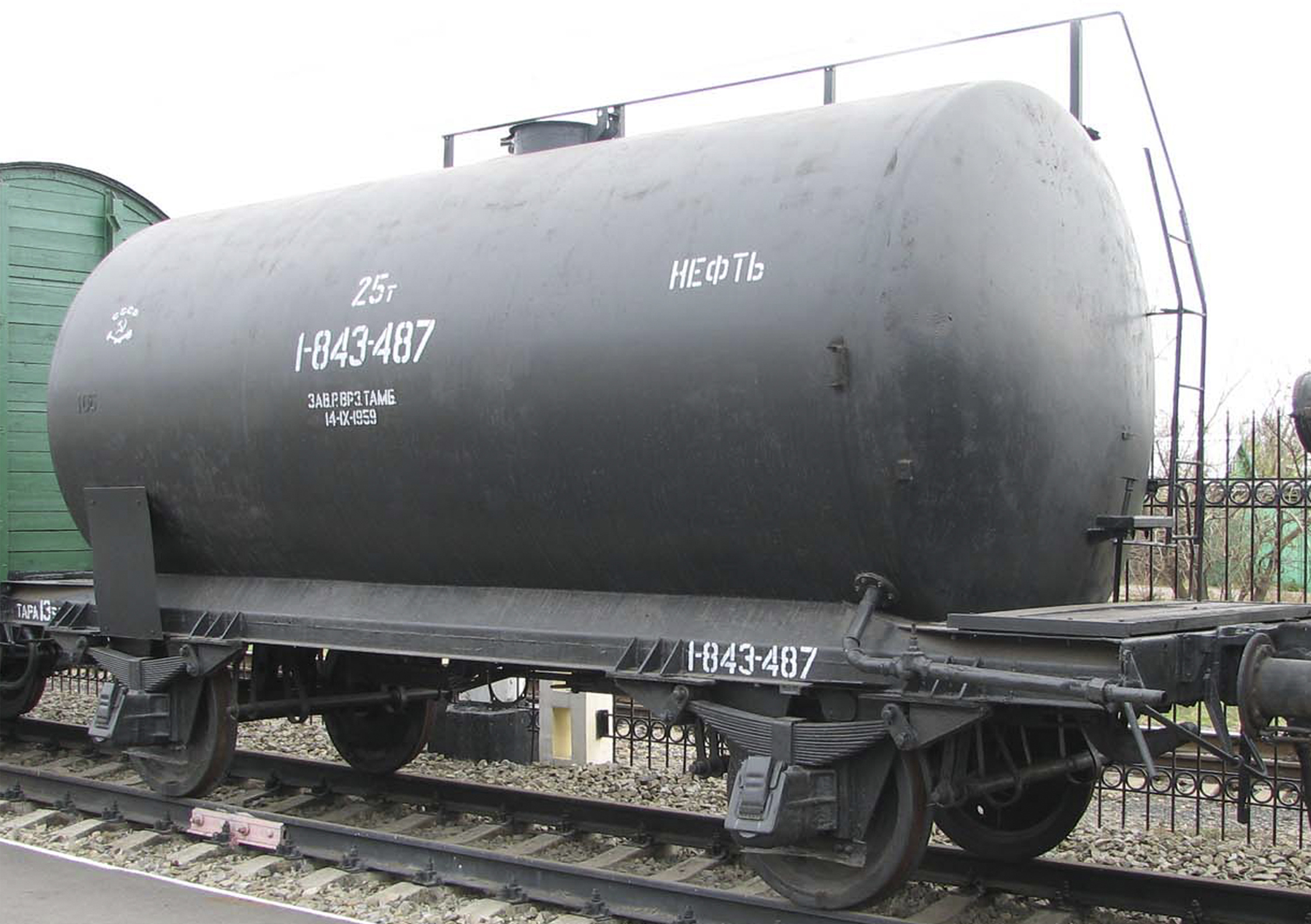 Цистерна построена в 1930-х годах заводом «КЕССЕЛЬ», Германия. Трофей Великой Отечественной войны